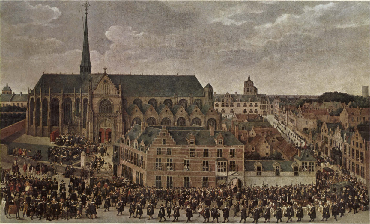 Atelier van Antoon Sallaert. Aartshertogin Isabella schiet de gaai af op het feest van de grote Voetbooggilde voor de Zavelkerk (Brussel). 17e eeuw, olieverf op doek Kasteel van Gaasbeek